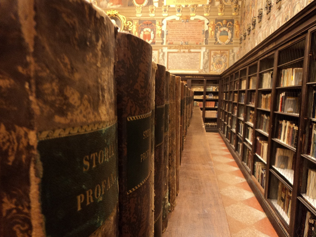 Sale storiche dell'Archiginnasio